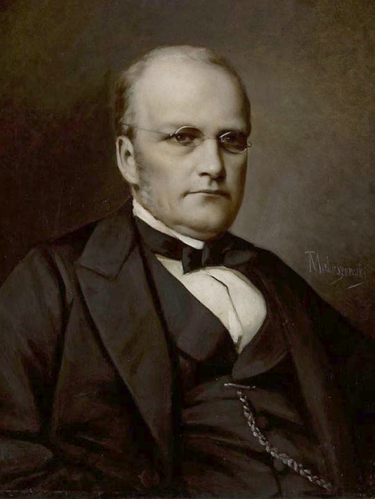 Беларуская (тарашкевіца): Партрэт Станіслава Манюшкі (Stanisłaŭ Maniuška)